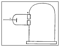 Tomado de JJ Thomson original de la publicación ( "Cathode Rays", de Londres, Edimburgo y Dublín Philosophical Magazine y en la Journal of Science).